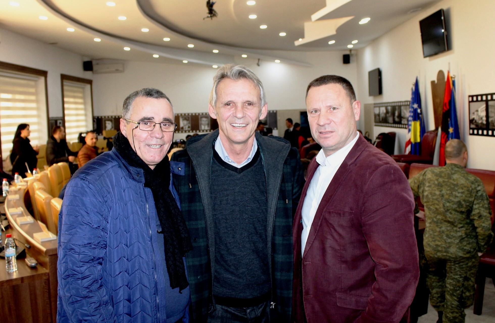 Veteranët e sportit të Gjilanit dhe Kosovës: Ismet Haziri (boksier), Muharrem Sahiti, (futbollist), Agim Latifi (boksier)